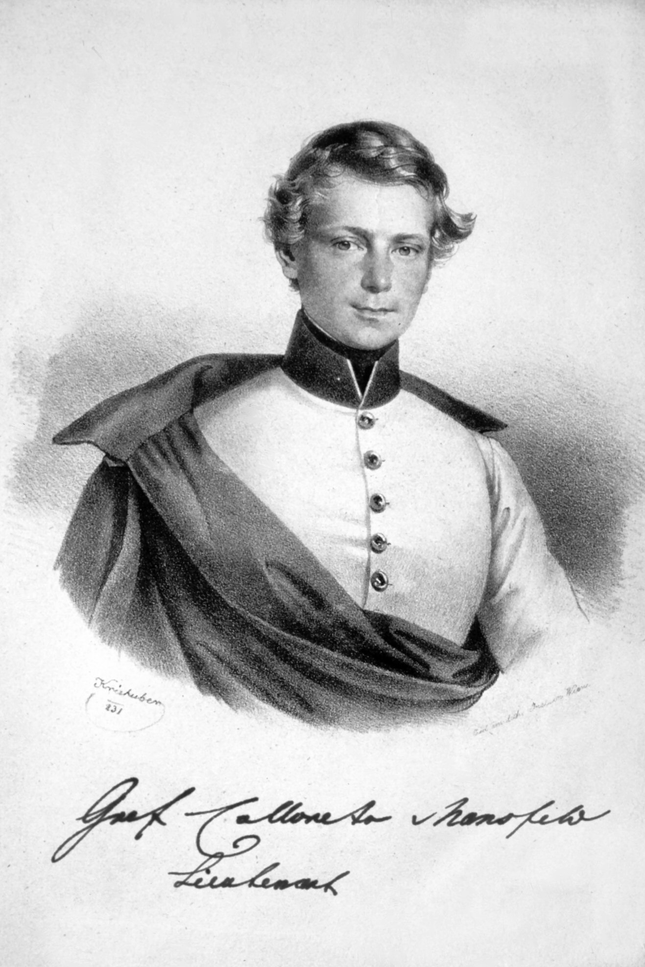 Franz de Paula Gundaccar II Colloredo-Mansfeld (1802-1852), als Leutenant